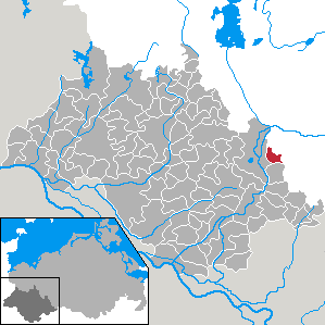 Brenz in Mecklenburg-Vorpommern - district Ludwigslust